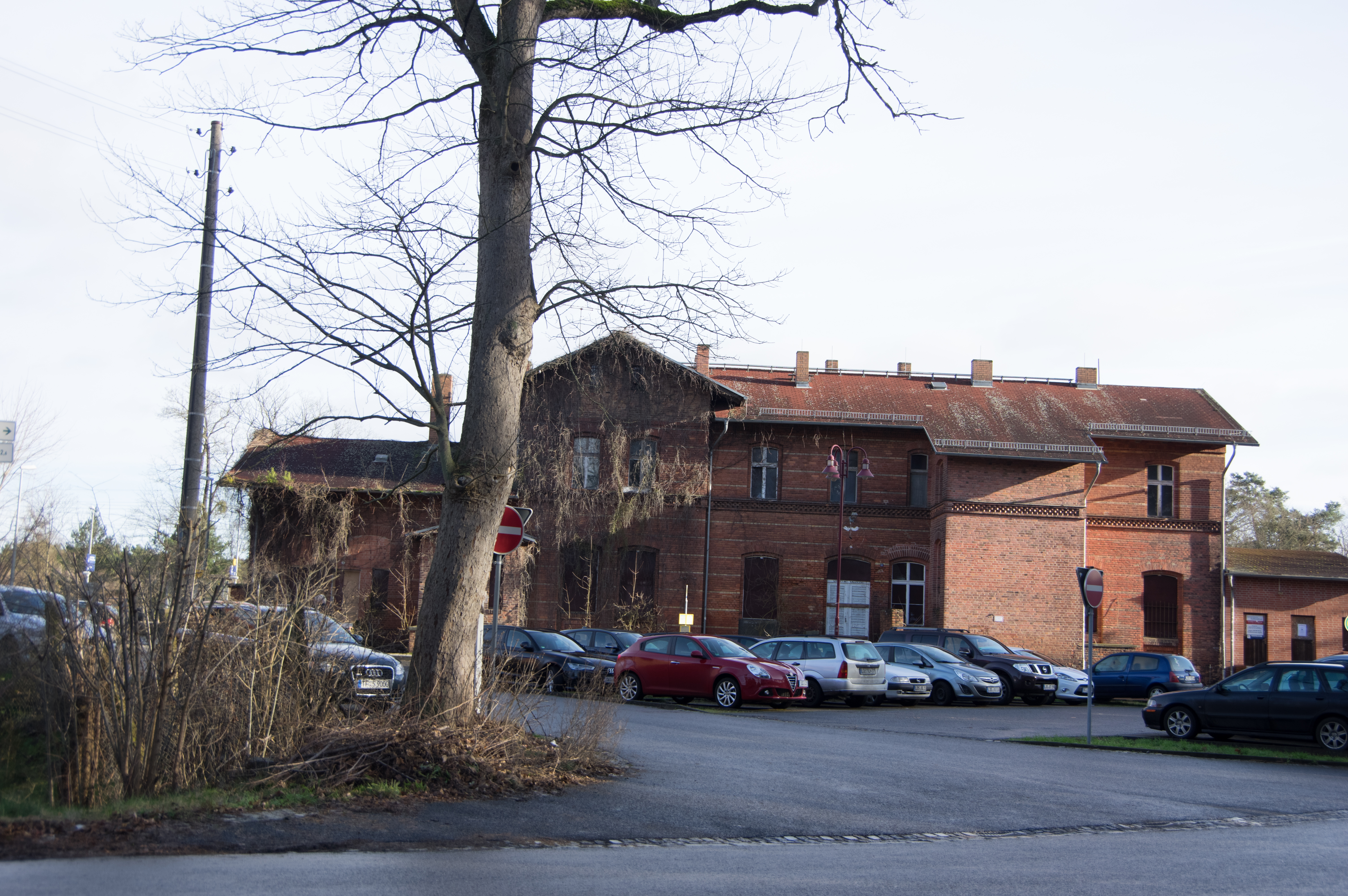 Halbe, Ortsteil Brand in Brandeburg. Der Bahnhof steht unter Denkmalschutz.